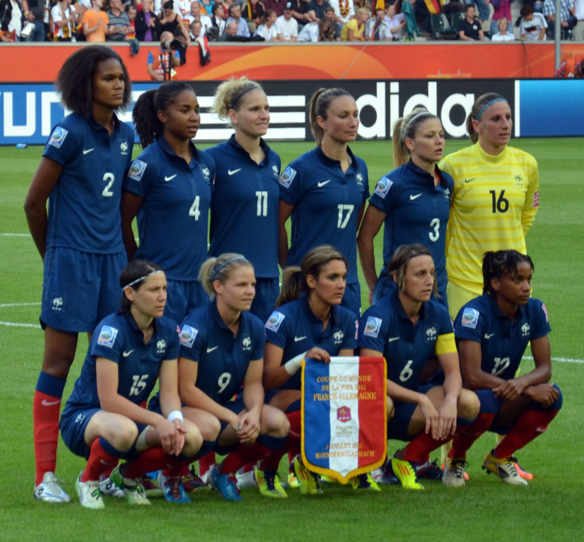 WM Vorrundenspiel zwischen Frankreich und Deutschland am 5. Juli 2011 im Borussiapark in Mönchengladbach Hinten v.l.n.r.: Renard, Georges, Lepailleur, Thiney, Boulleau, Sapowicz; Vorne v.l.n.r.: Bussaglia, Le Sommer, Nécib, Soubeyrand, Thomis